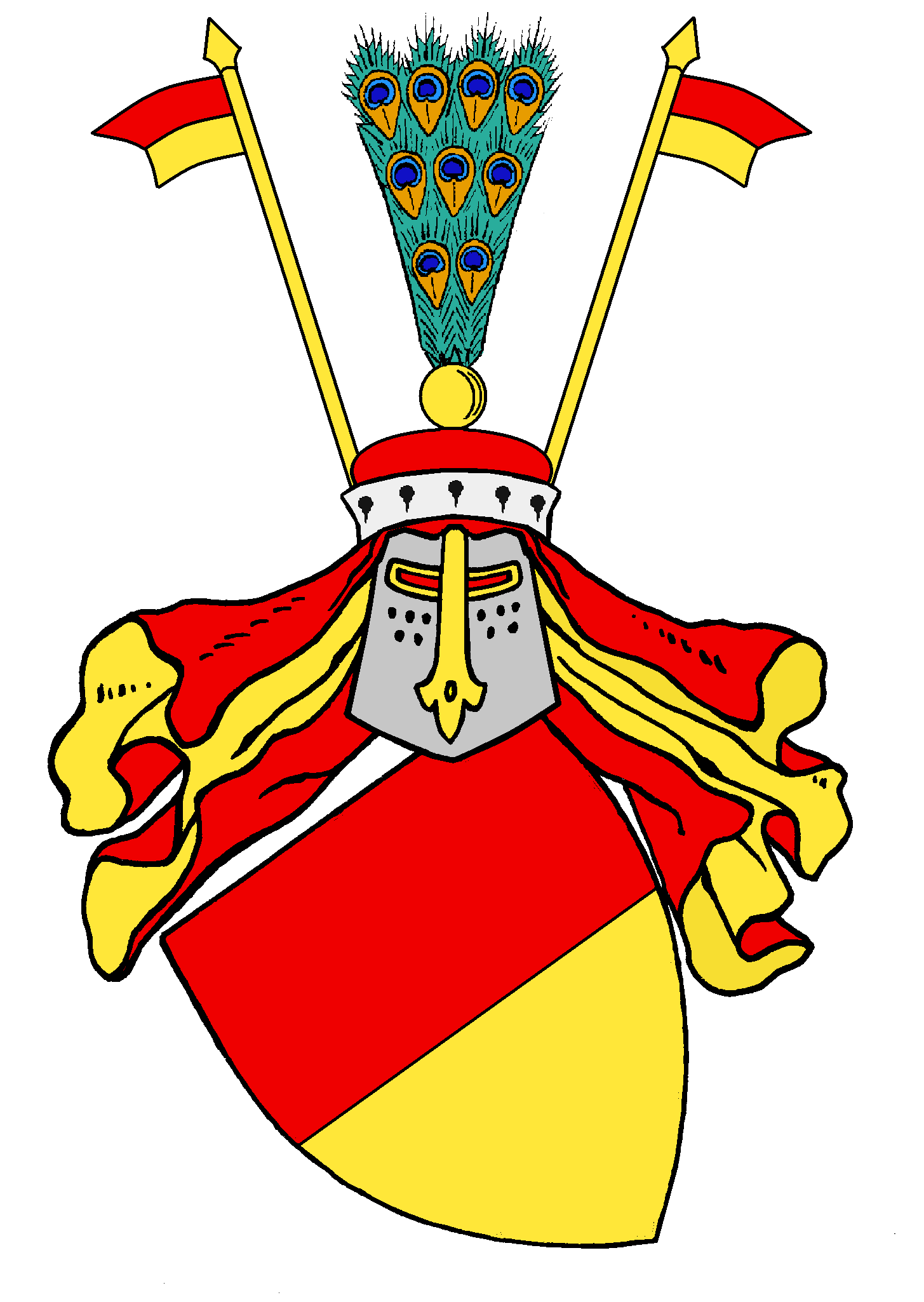 Stammwappen (etwas spätere Variante) des bedeutenden Geschlechts der Reichsministerialen von Hagen-Münzenberg, das vorwiegend in der Wetterau und südlich von Frankfurt begütert war. Es wurde von den reichsgräf- und fürstlichen Hausern Falkenstein, Eppstein, Hanau, Solms und Hessen beerbt, die das Wappen in ihr jeweiliges Wappen aufnahmen. Eine Wappenverwandtschaft besteht zu den alten Grafen von Schwerin, deren Dynastie ihre Stammreihe mit Gunzelin von Hagen begann.